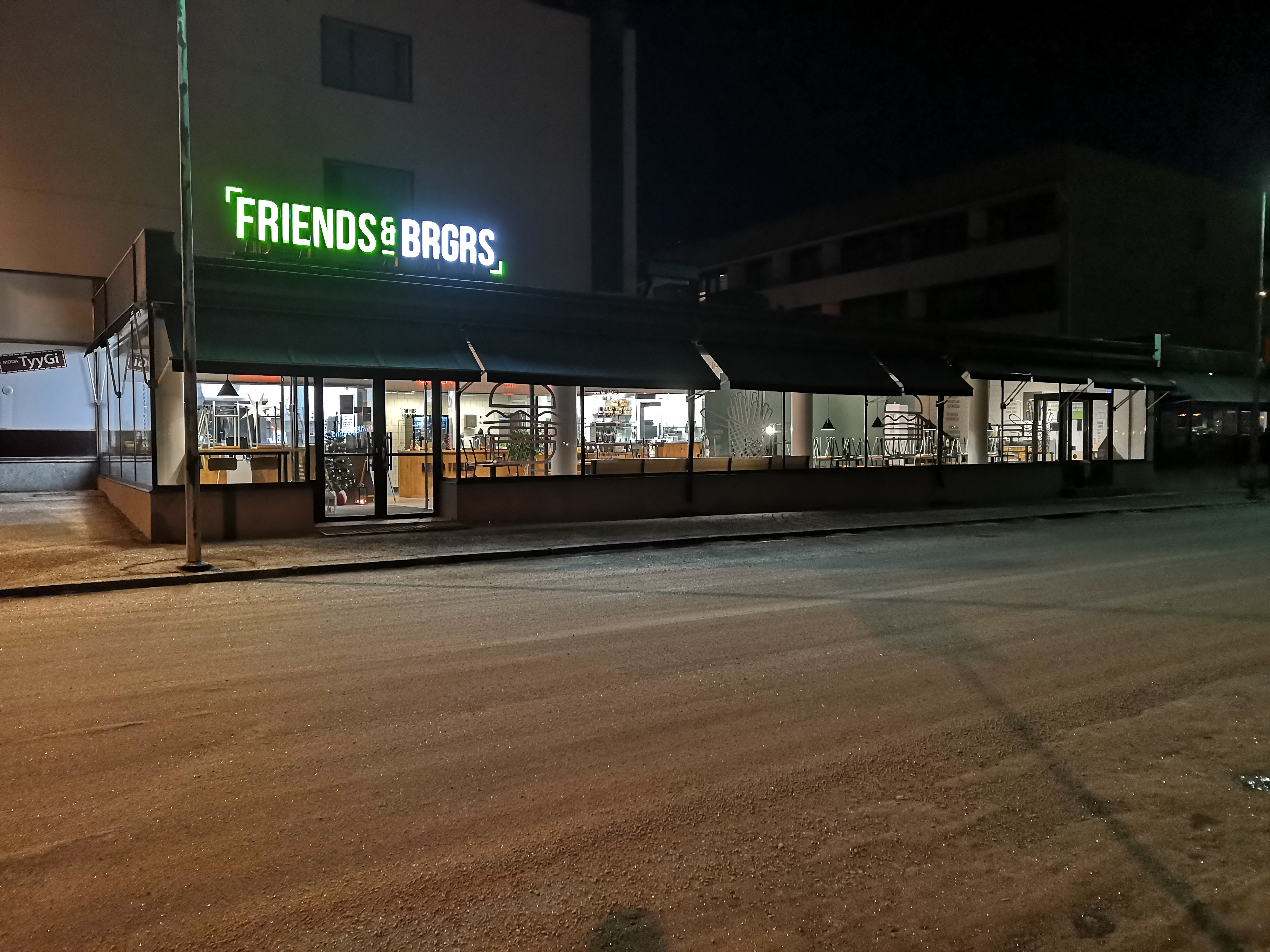 Friends & Brgrs pikaruokaravintola Pietarsaaressa